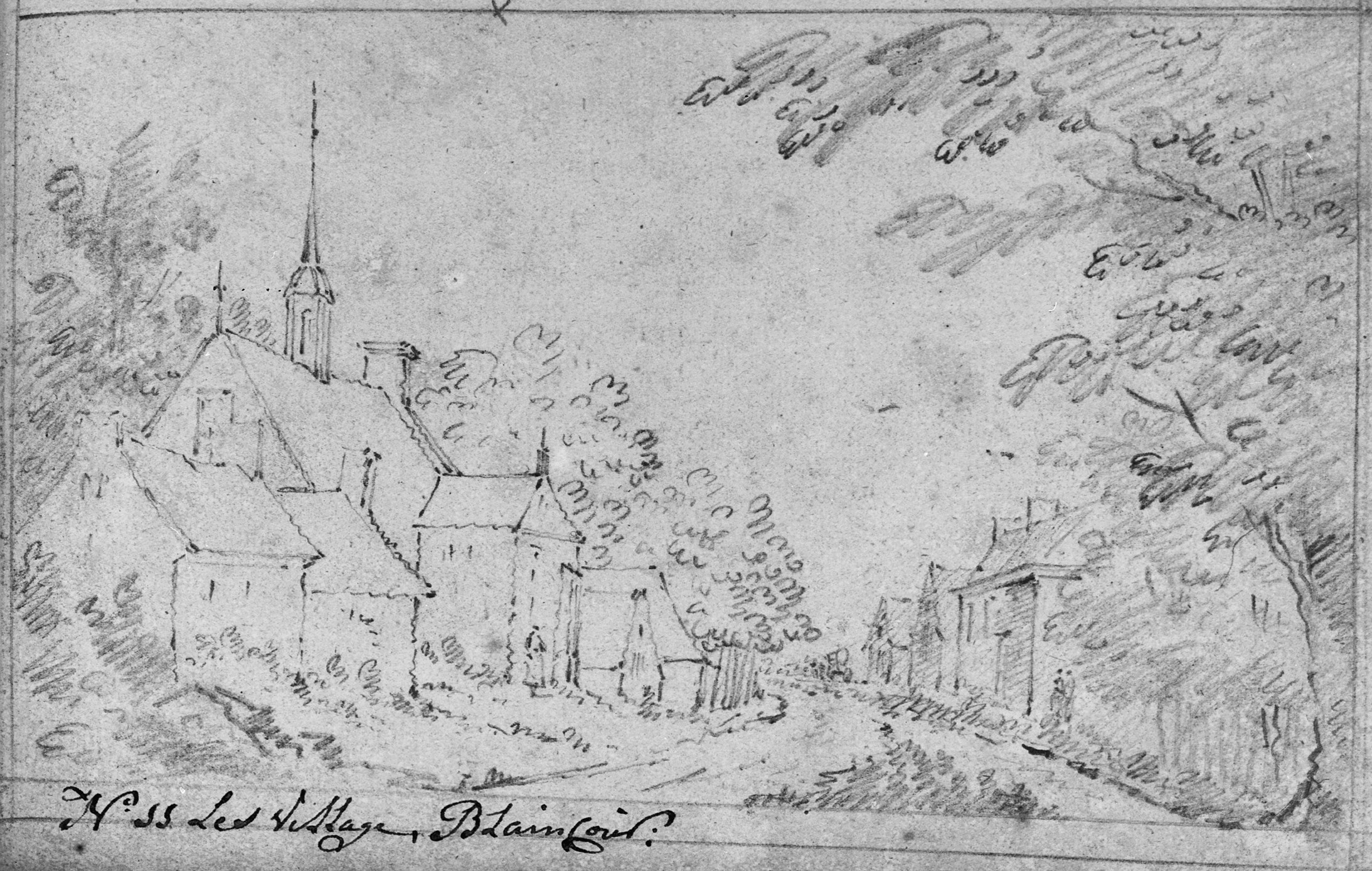 Dorpsgezicht: Dorpsgezicht uit 't schetsboek van Dirk Verrijk